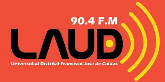 Emisora de la Universidad Distrital